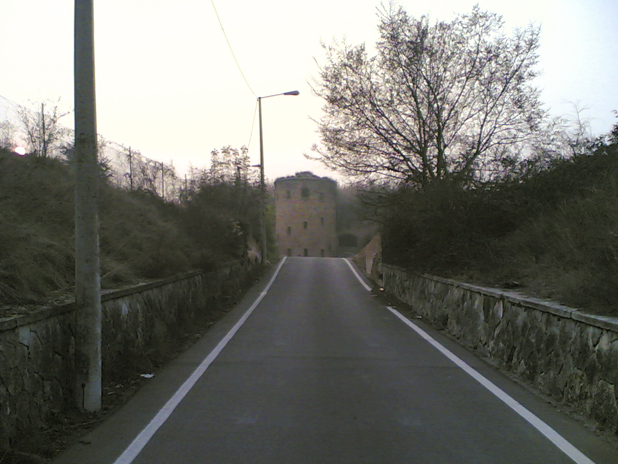 Strada che porta al Forte San Zeno